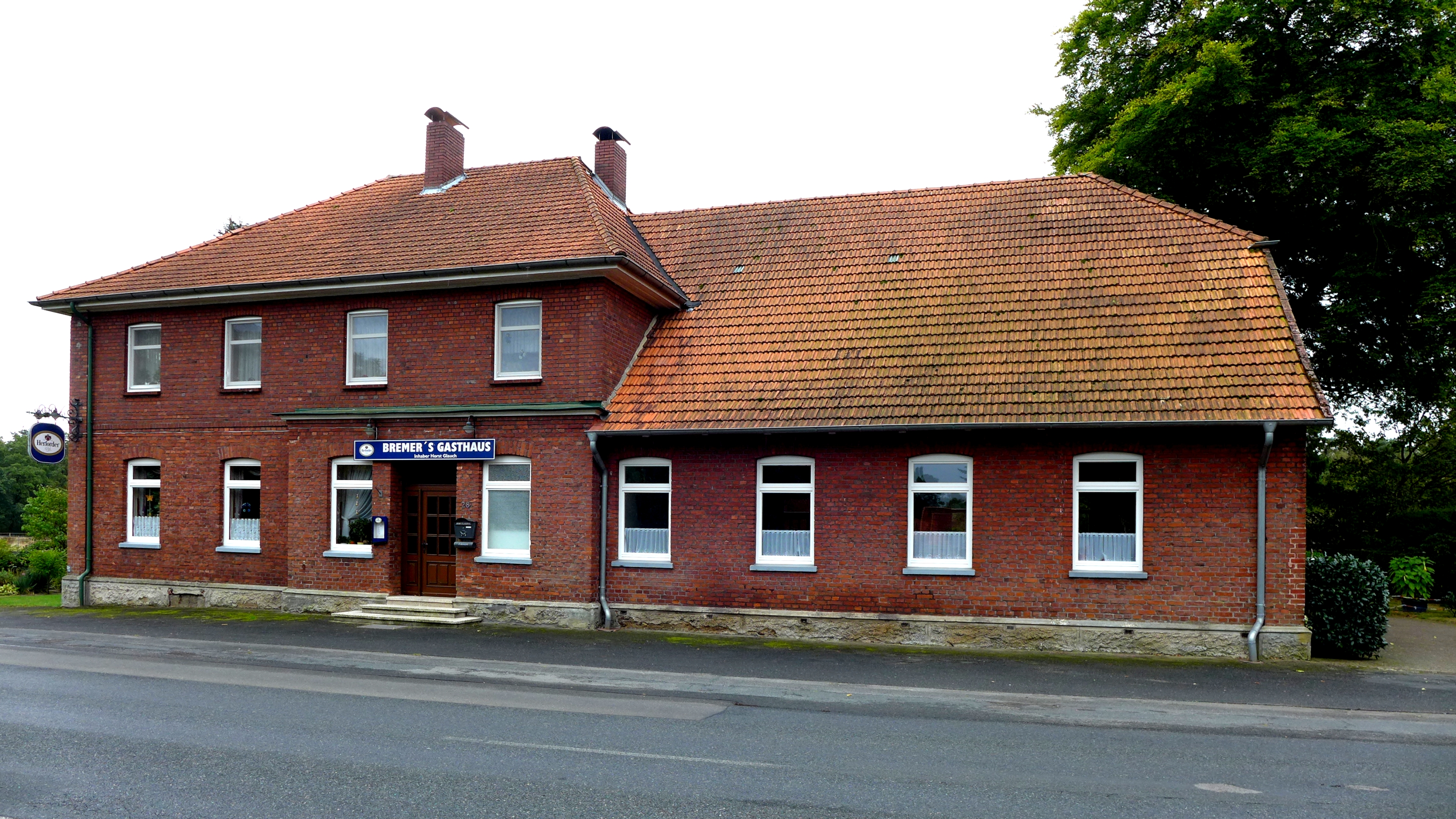 Bremer's Gasthaus seit 1910 an der Landesstraße 171 in Drögenbostel, einem Ortsteil von Visselhövede. Aufnahmedatum 2016-10.